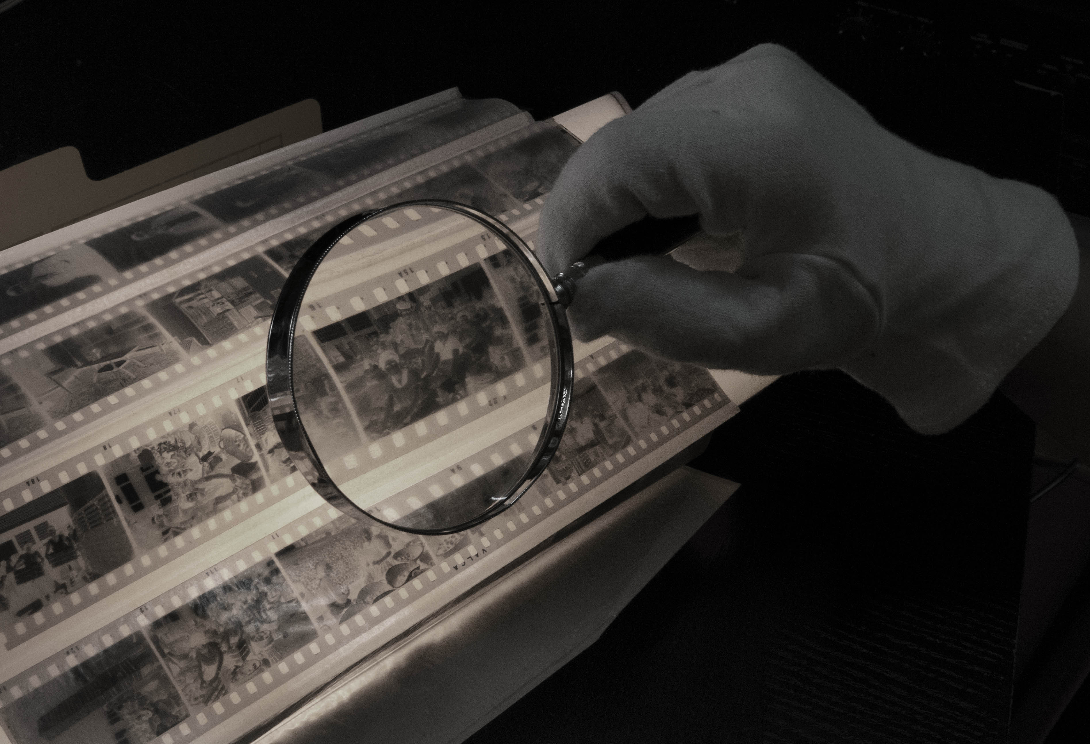 Amb una lupa (lent convergent) s'hi poden visualitzar els negatius de l'arxiu sense esforç.